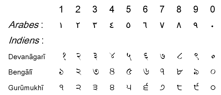 Comparaison entre les chiffres dits « arabes », les chiffres indiens et les chiffres réellement arabes empruntés aux Indiens